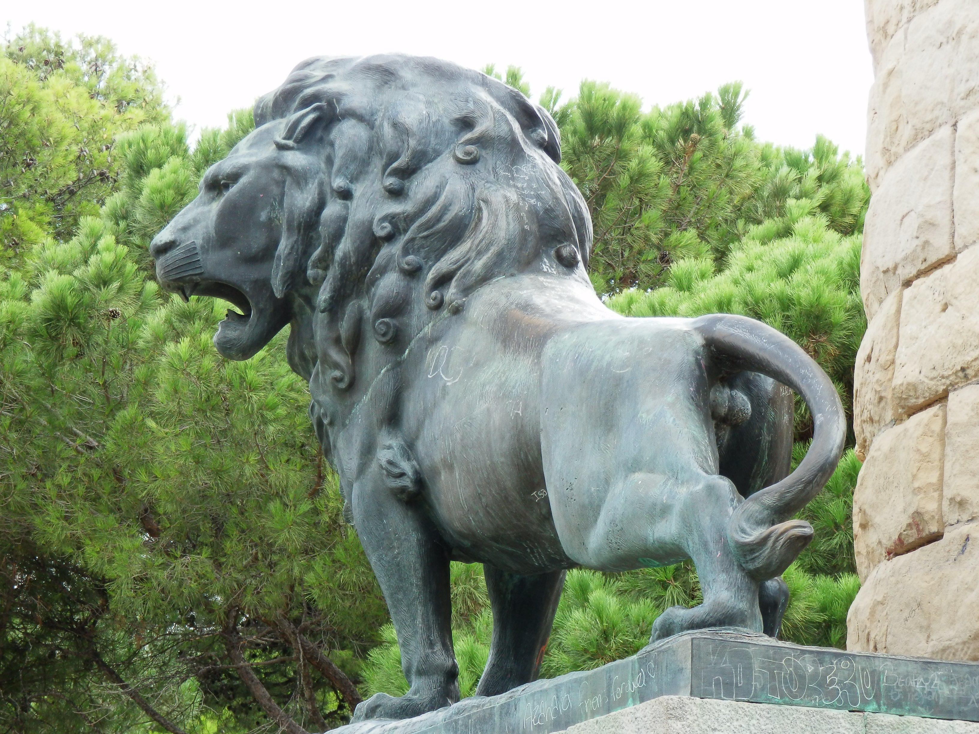 Escultura de león en el monumento al rey Alfonso I el Batallador. Realizada por Virgilio Garrán Rico.